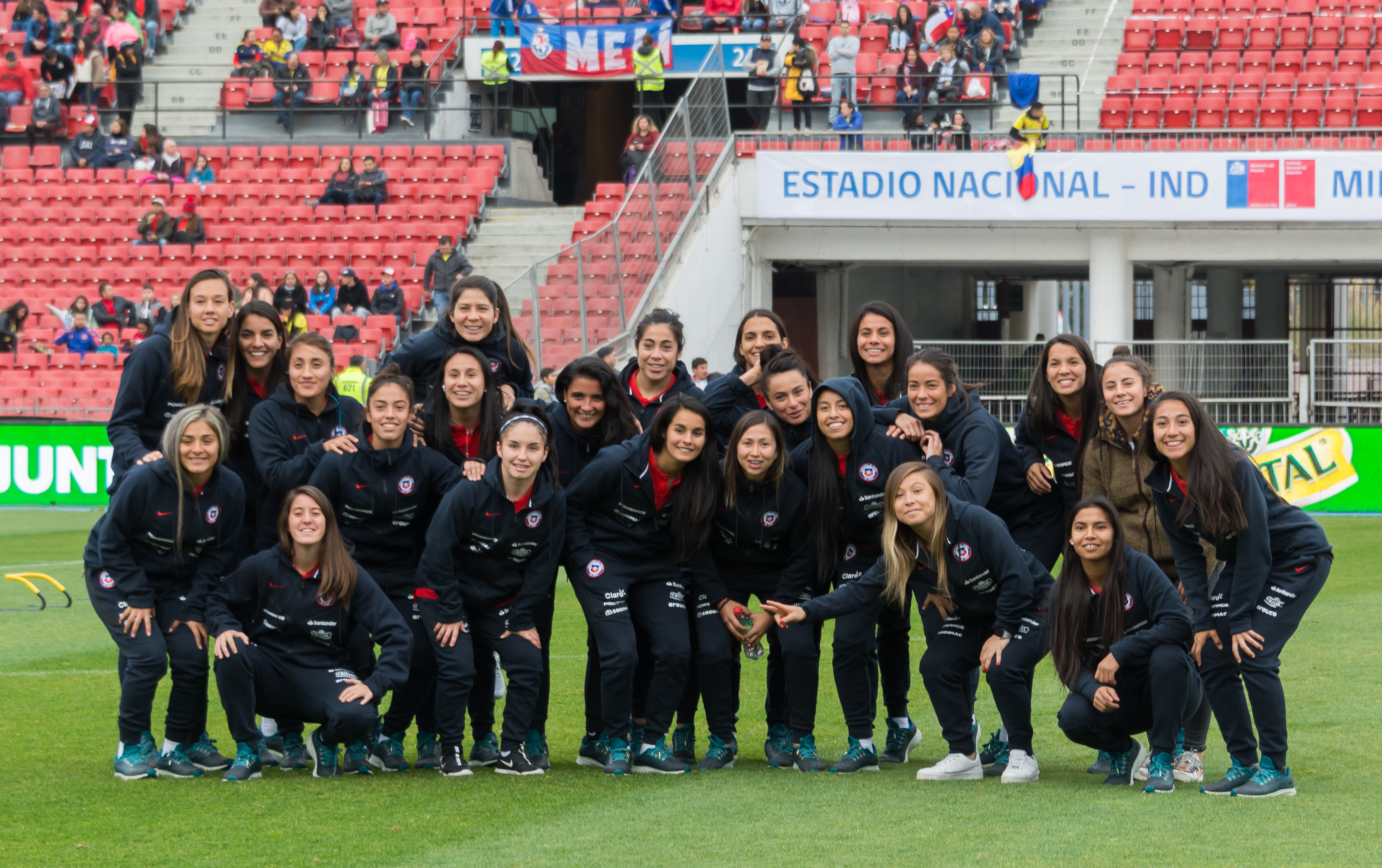 Selección femenina de fútbol de Chile, Chile v Colombia, Estadio Nacional, Ñuñoa, Santiago, Chile.